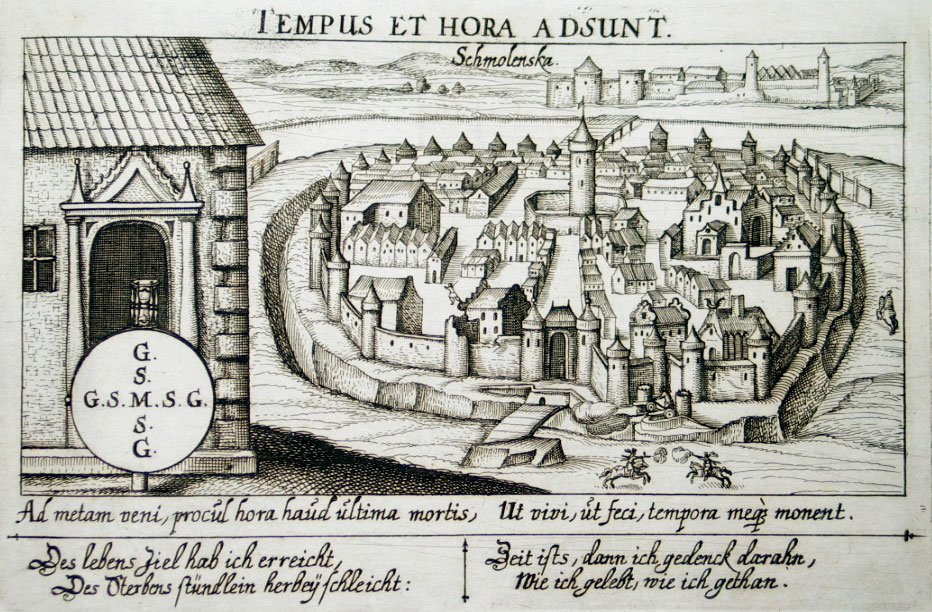 Беларуская (тарашкевіца): Смаленск (Smalensk). Плян места